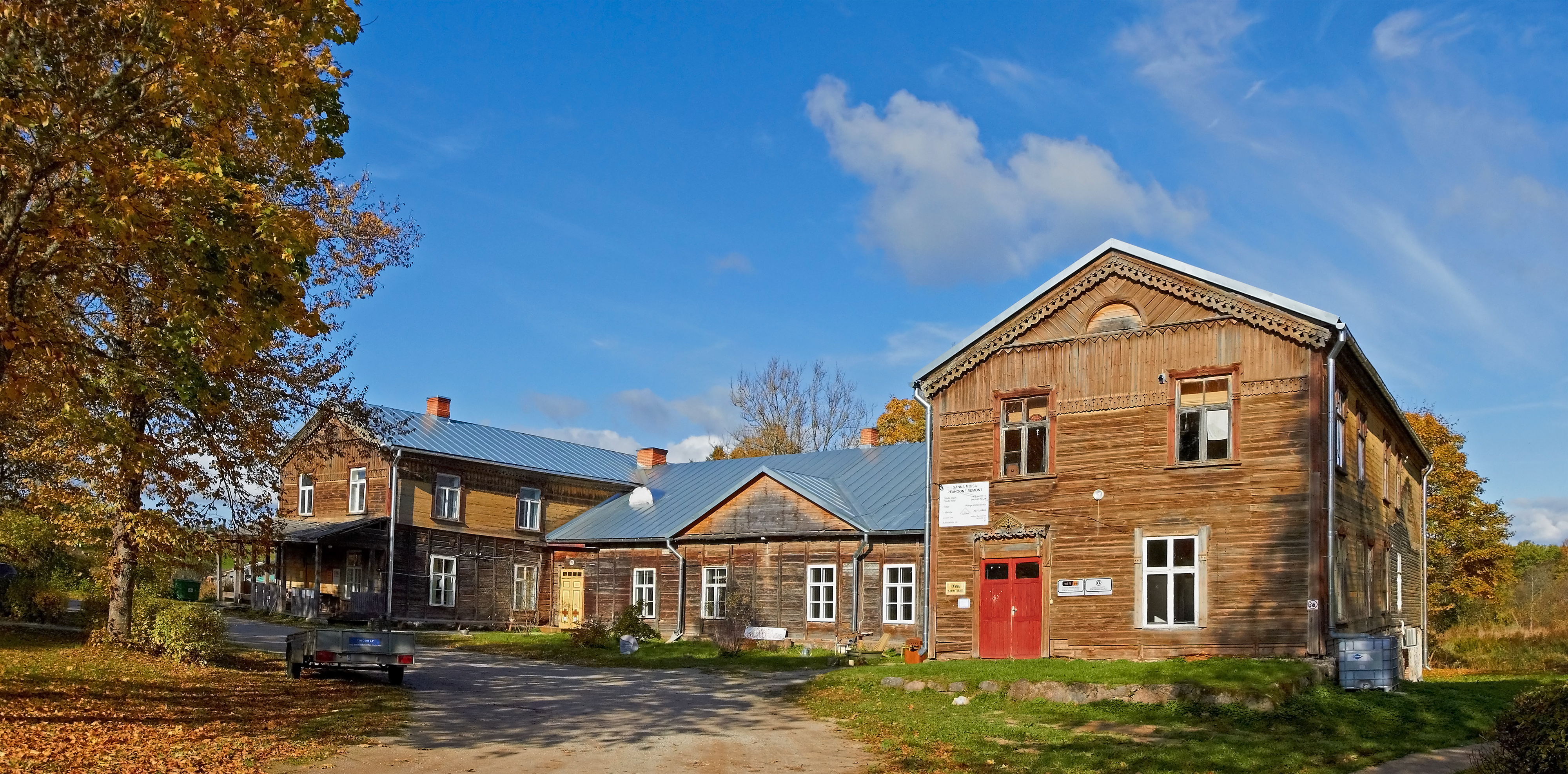 Sänna mõisa peahoone enne remonti 2011. aastal.